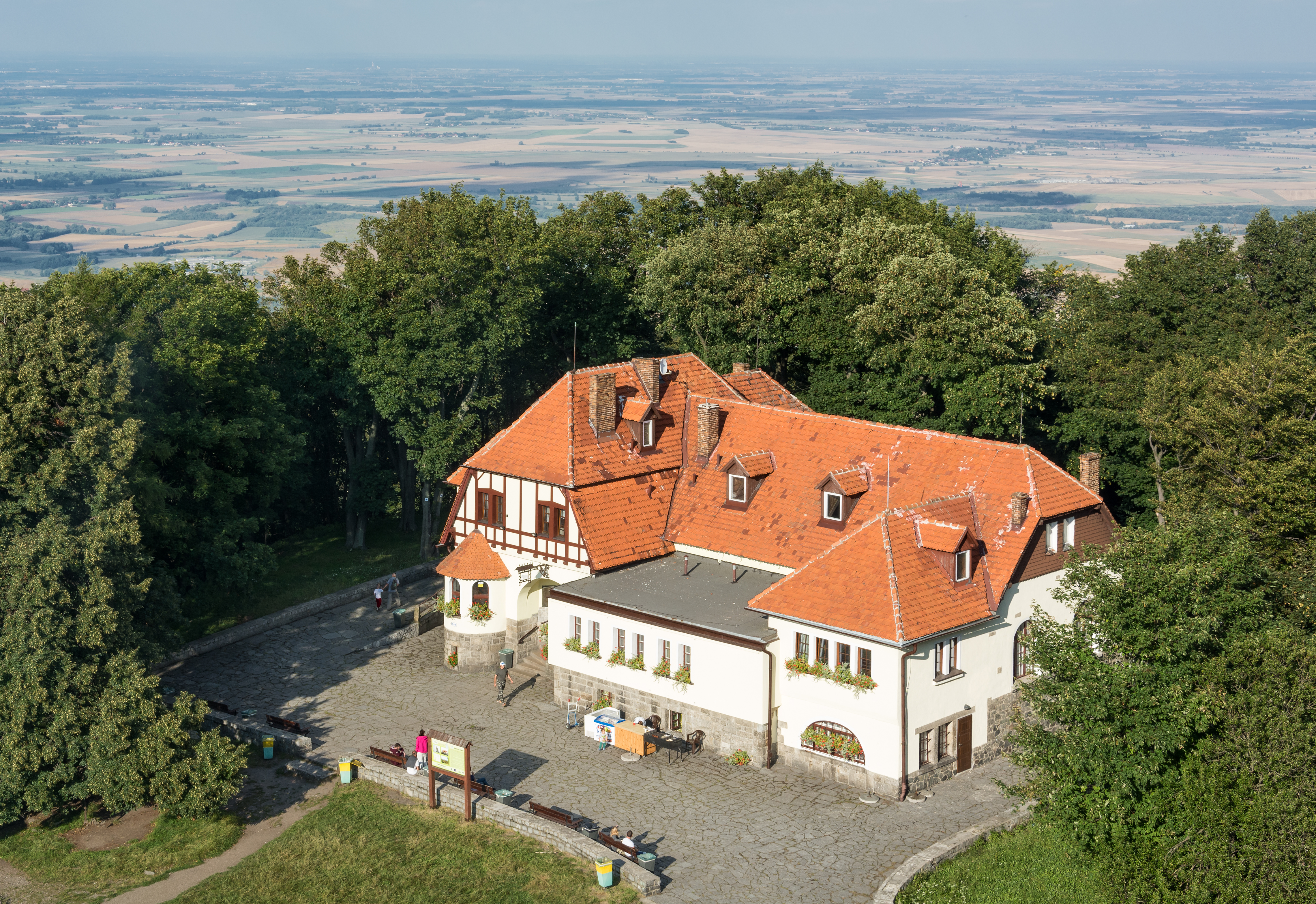 Sobótka, schronisko im. R. Zamorskiego na szczycie góry Ślęży, 1908